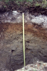 By Jon Petter Gustafsson. dette ere en lite myrebyggd. Stormyran, County of Västerbotten, Sweden